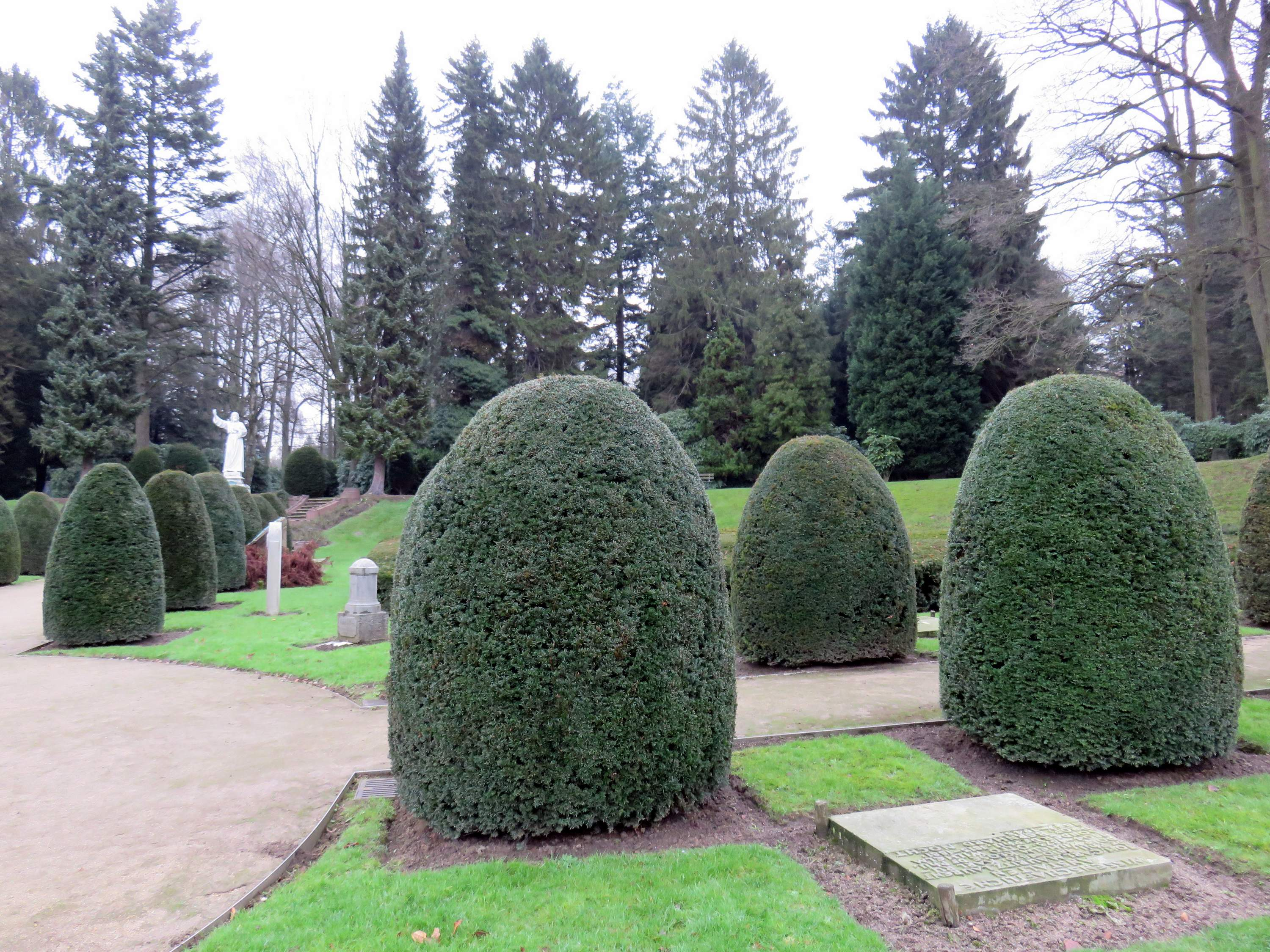 Sammelgrabmal Wissenschaftliche Anstalten im Bereich des Althamburgischen Gedächtnisfriedhofs auf dem Hamburger Friedhof Ohlsdorf, südöstliche Querachse, zu Ehren von unter anderen Karl Rudolf Wilhelm Klose, Otto Wilhelm Sonder, Prof. Bernard Nocht.